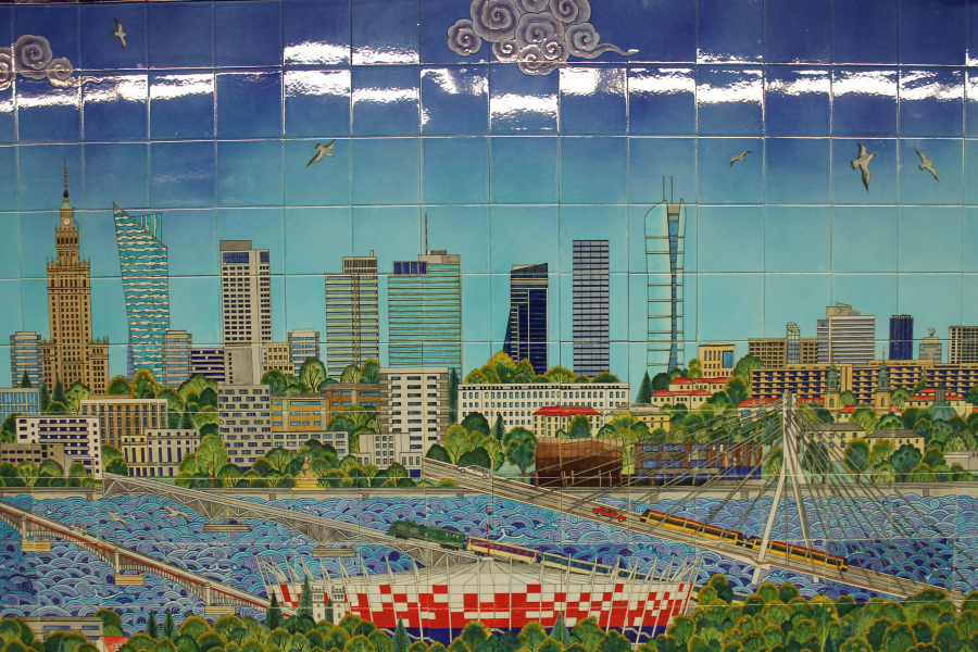 Zbliżenie fragmentu mozaiki przedstawiającej panoramę Warszawy na południowej antresoli stacji metra A11 Politechnika.